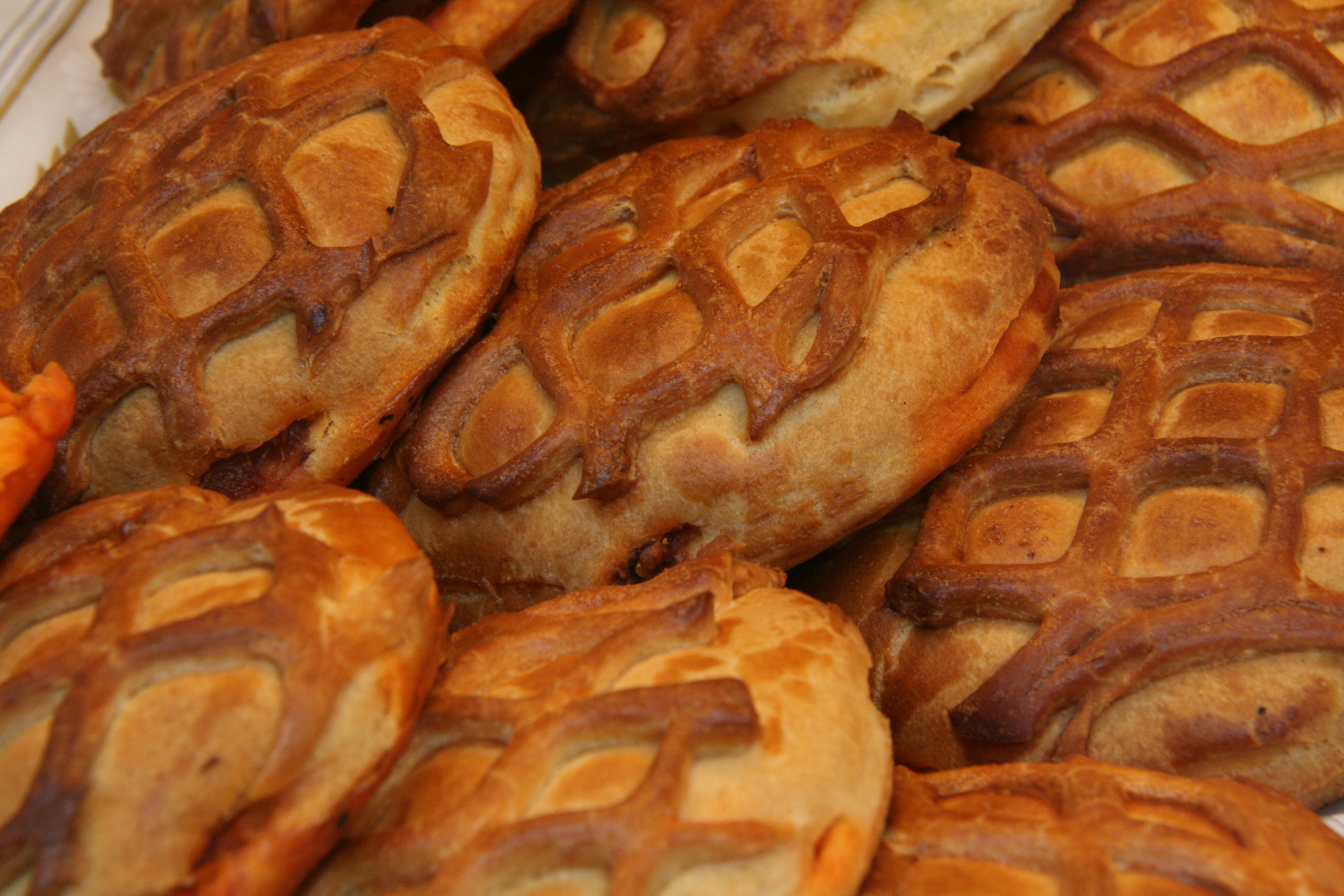 Hornazo en forma de empanadillas (empanada) - Salamanca